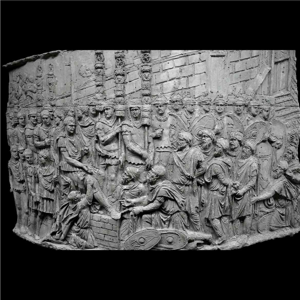 Moulage de la frise de la colonne Trajane, exposé au Museo della Civiltà Romana, Rome.